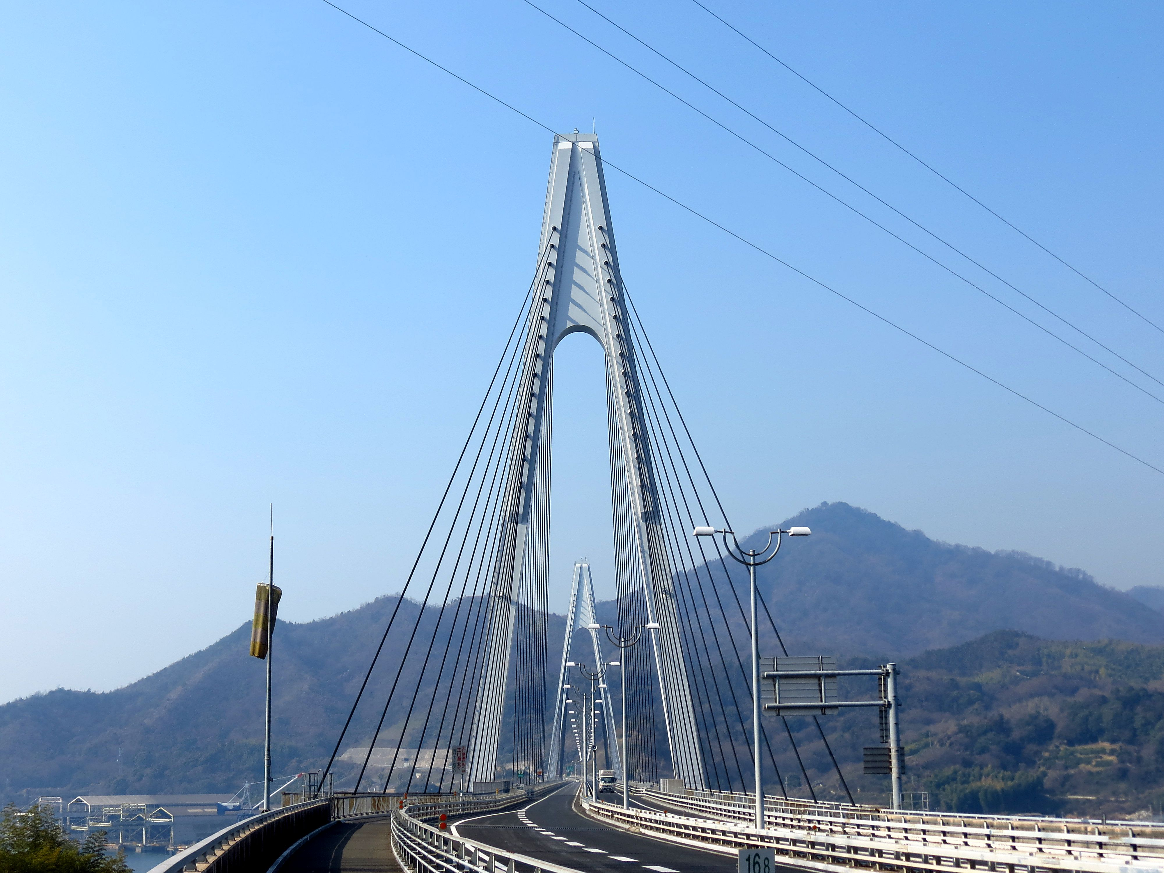 Ikuchi Bridge